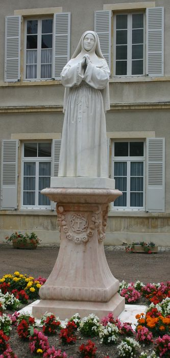 Statue de Bernadette à Nevers (Nièvre)